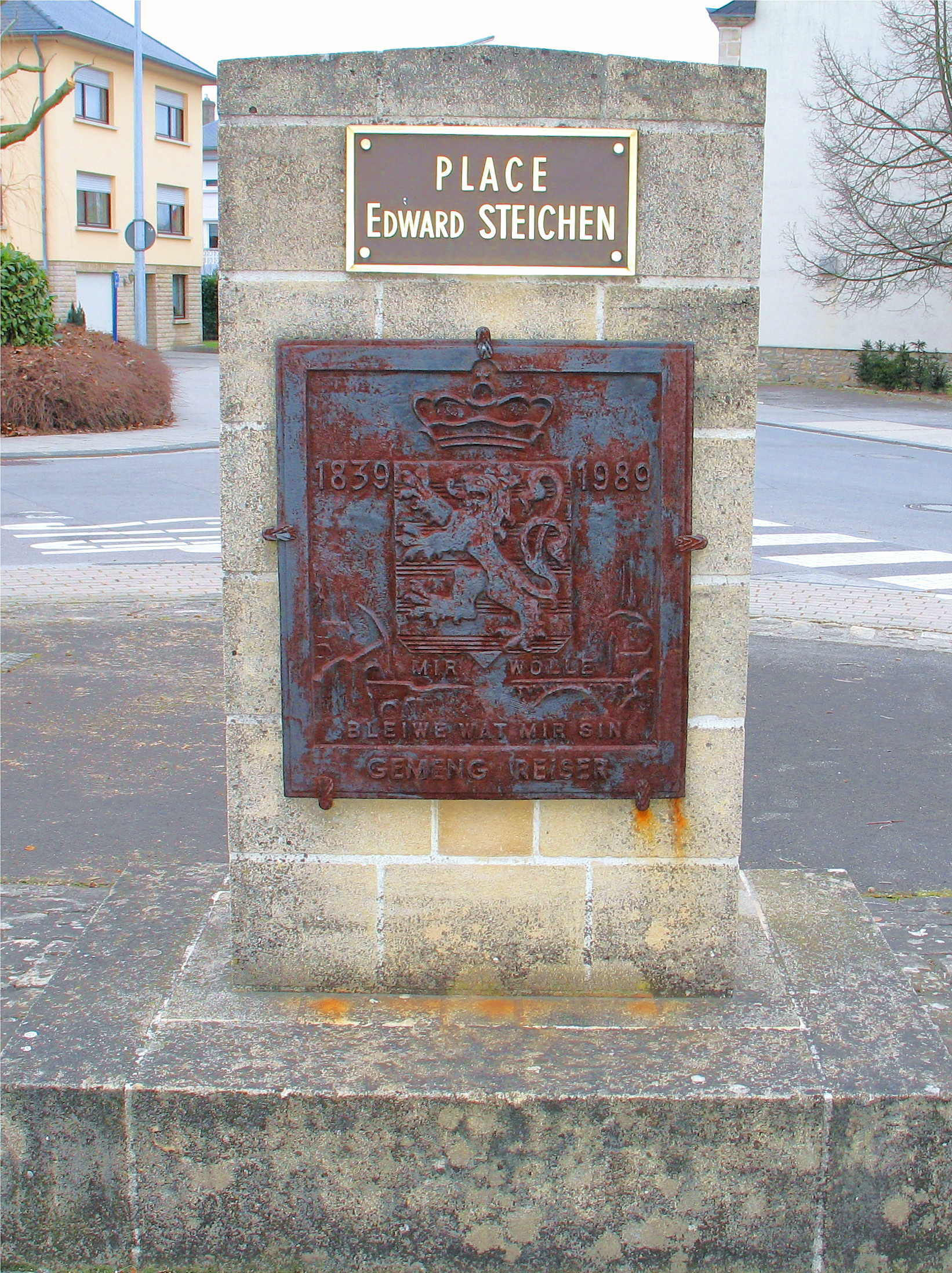 Plaz Edward Steichen zu Béiweng